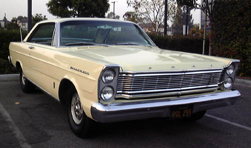 1965 Ford Galaxie 500 2-Door Hardtop.